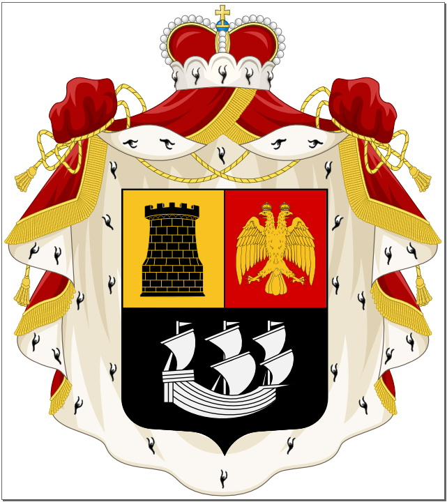 герб рода князей Андроникашвили